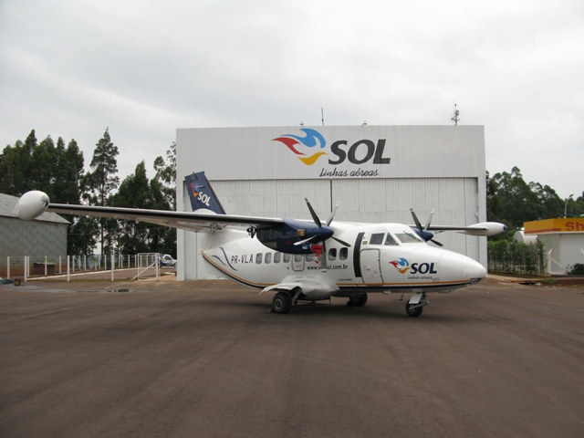 LLegada de la aeronave LET-10 UVP E20 matricula PR-VLA en el Centro de Operaciones de la Sol Linhas Aéreas